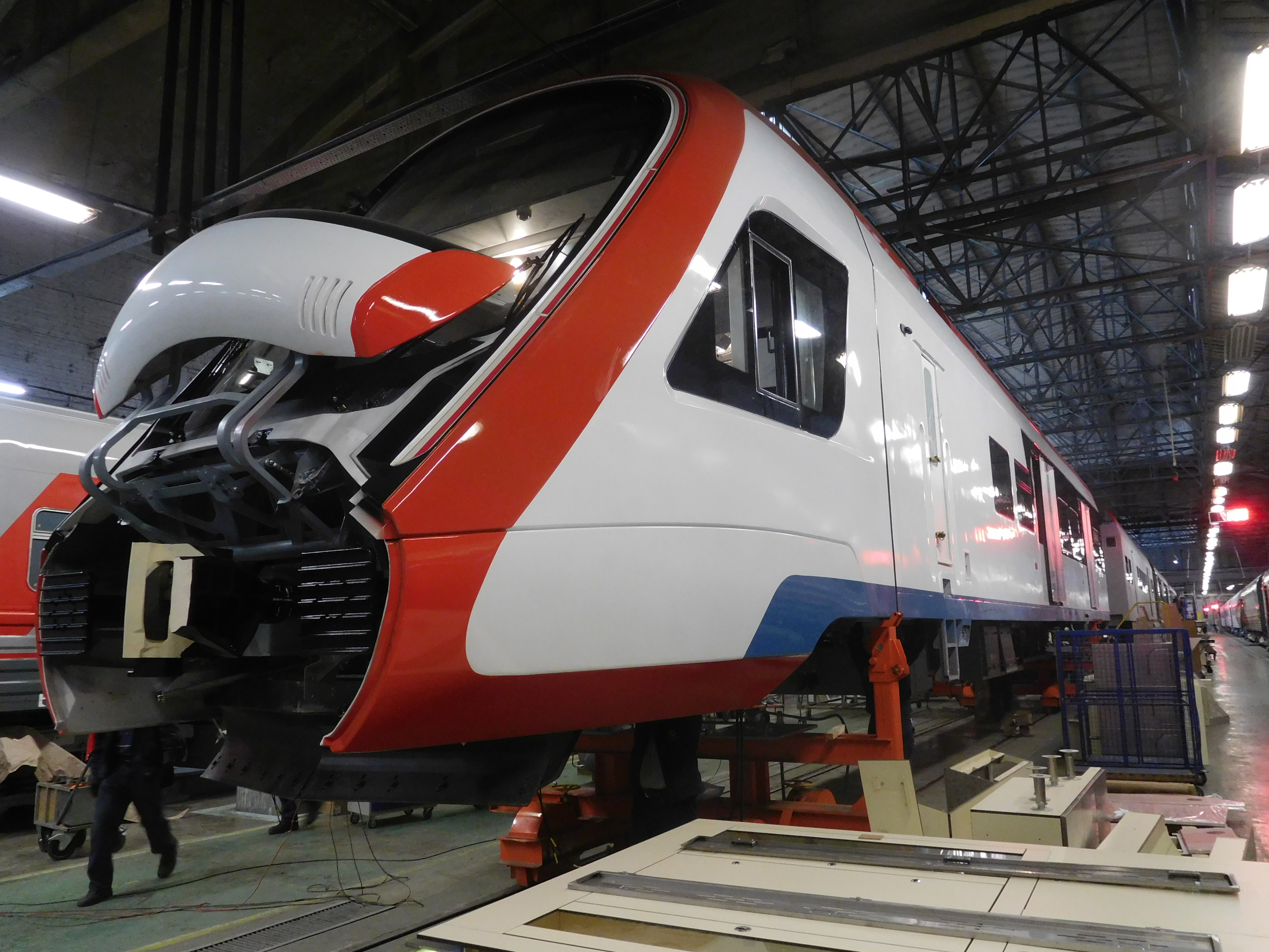 Электропоезд ЭГ2Тв «Иволга» с поднятым носовым обтекателем в сборочном цехе Тверского вагоностроительного завода (Трансмашхолдинг).